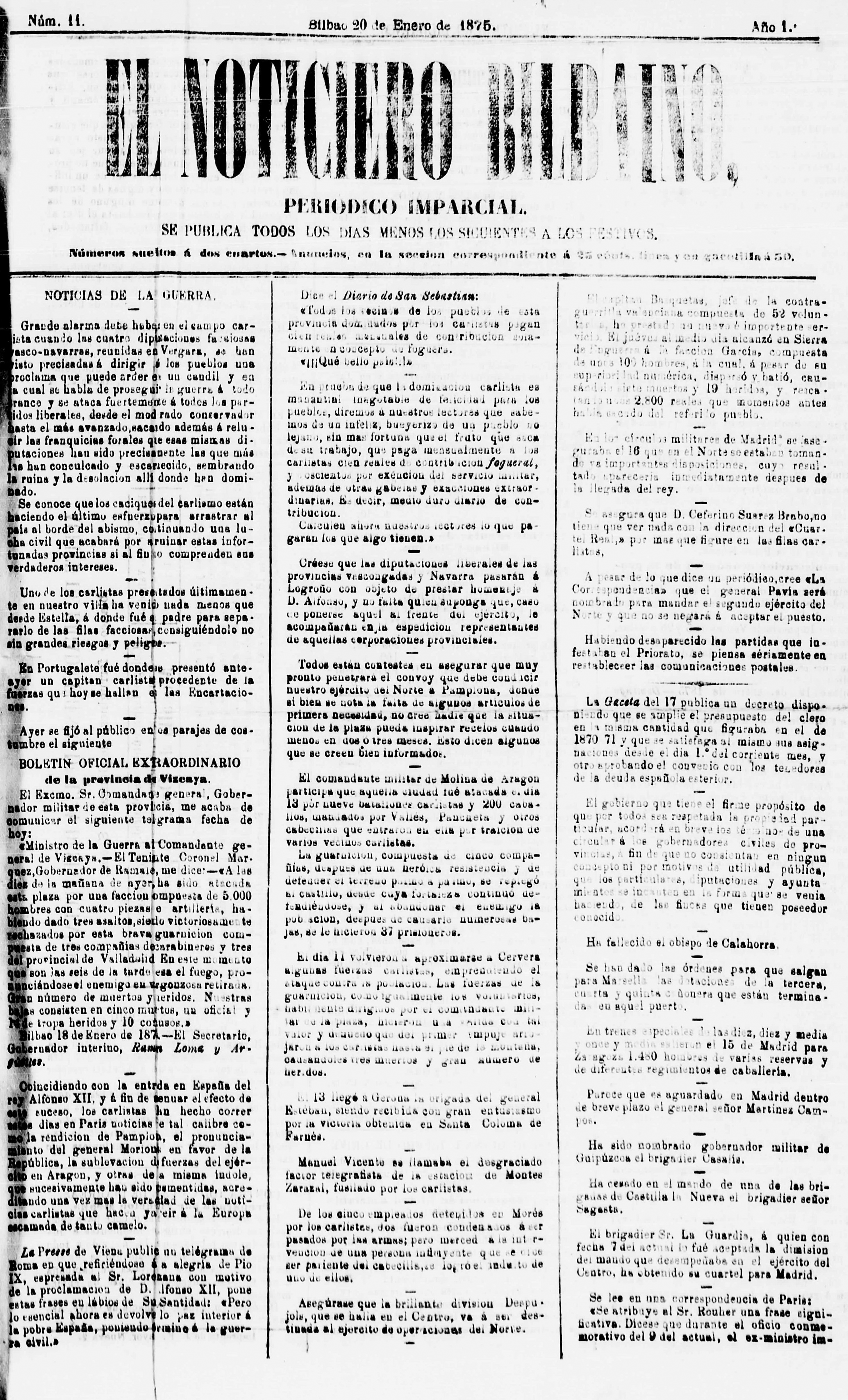 El Noticiero Bilbaíno, 20 de enero de 1875.